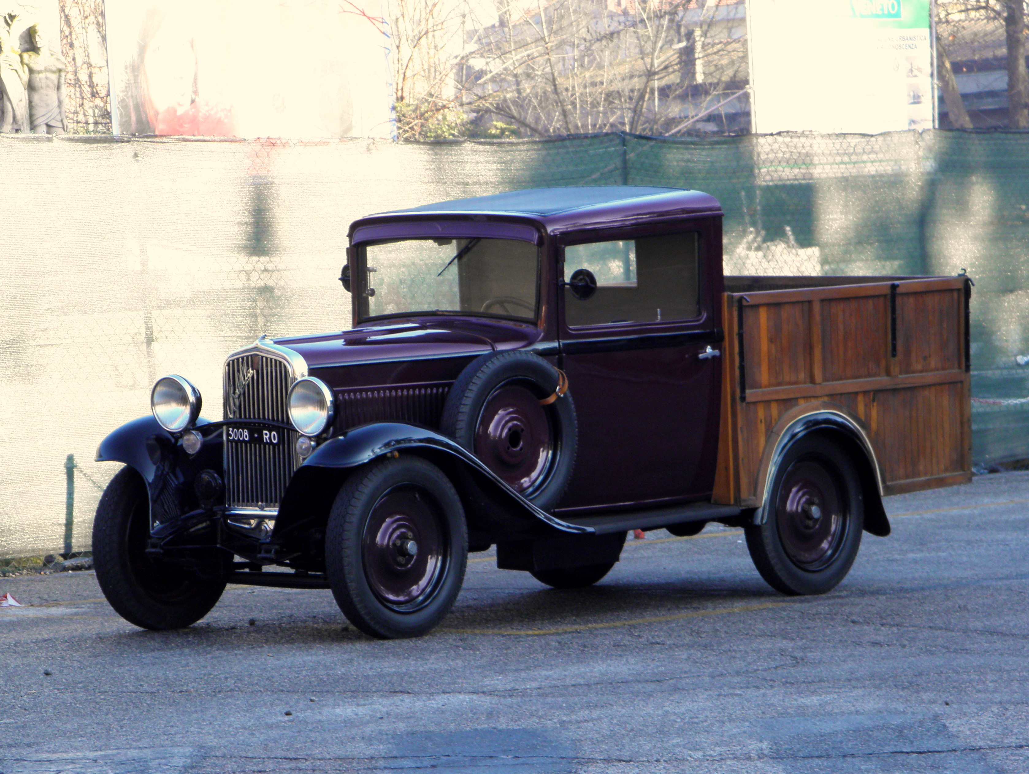 Fiat 508 Balilla Autocarro fotografata a Rovigo in Piazzale della Riconoscenza.